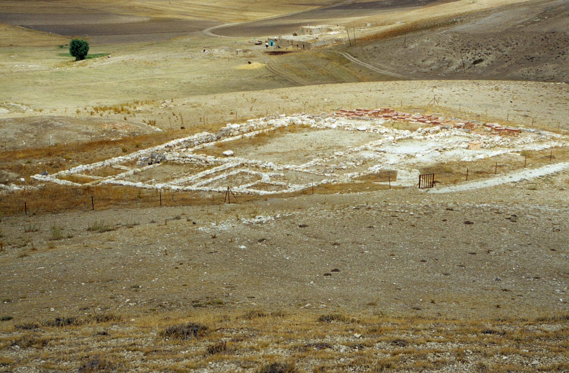 Tempel 1 auf der Nordterrasse des hethitischen Siedlungshügels von Kuşaklı-Sarissa in der Zentraltürkei